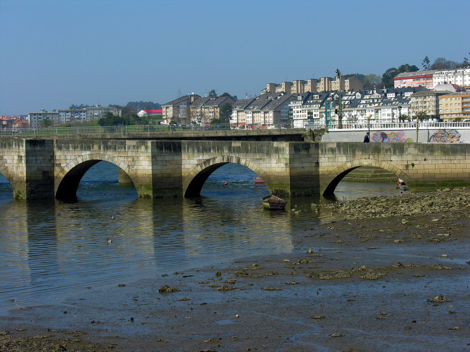 Cambre, Galiza, Spain.